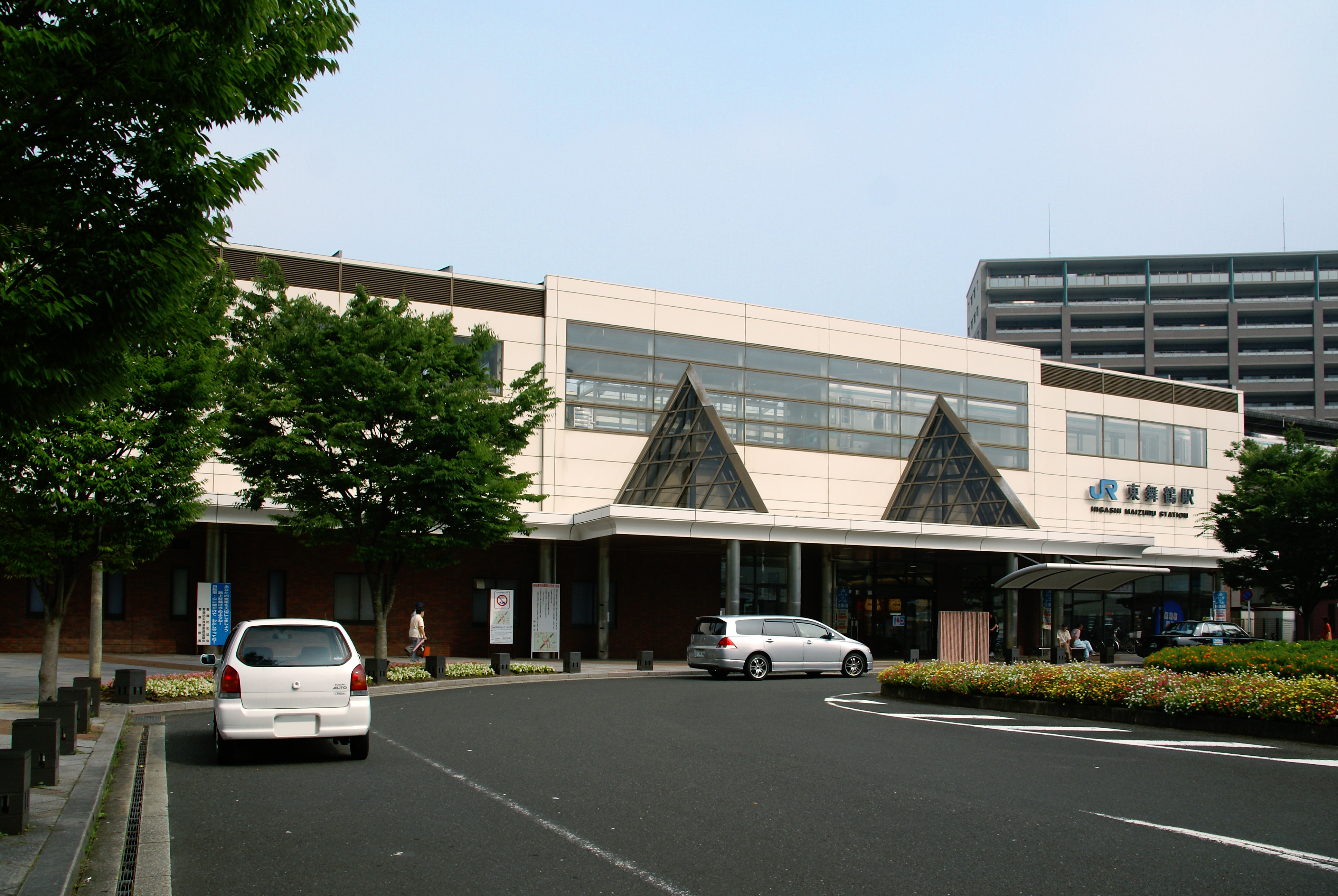 Higashi-Maizuru Station in Maizuru, Kyoto prefecture, Japan